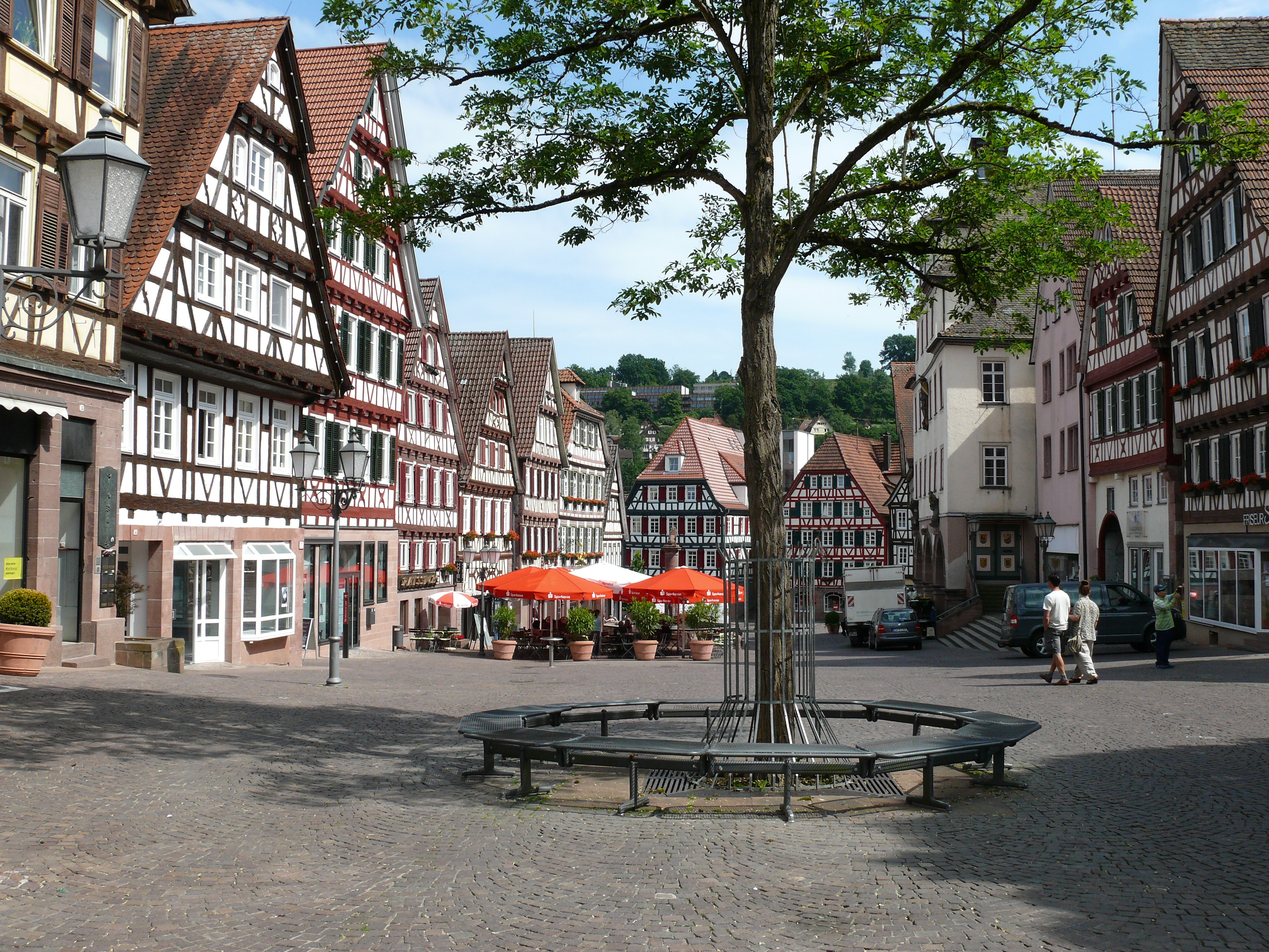 Der Marktplatz in Calw, mit dem Rathaus rechts un dem Geburtshaus von Hermann Hesse links (vorletztes Haus).